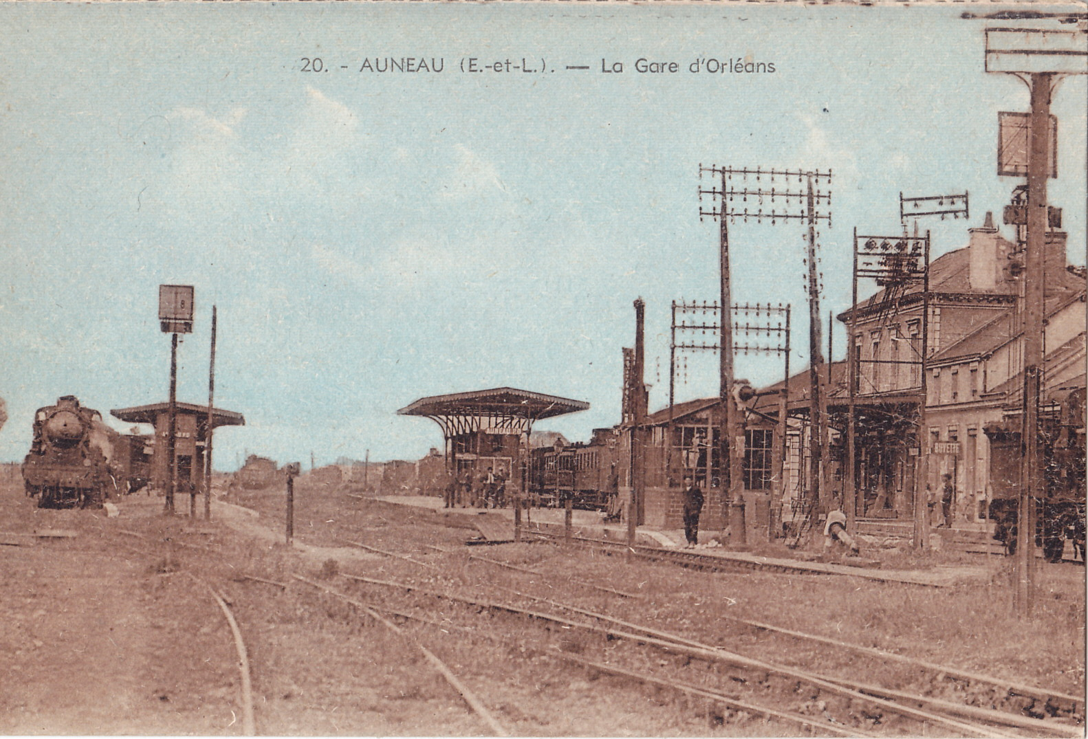 Carte postale ancienne éditée par G. Foucault à Dreux : AUNEAU - La Gare d'Orléans